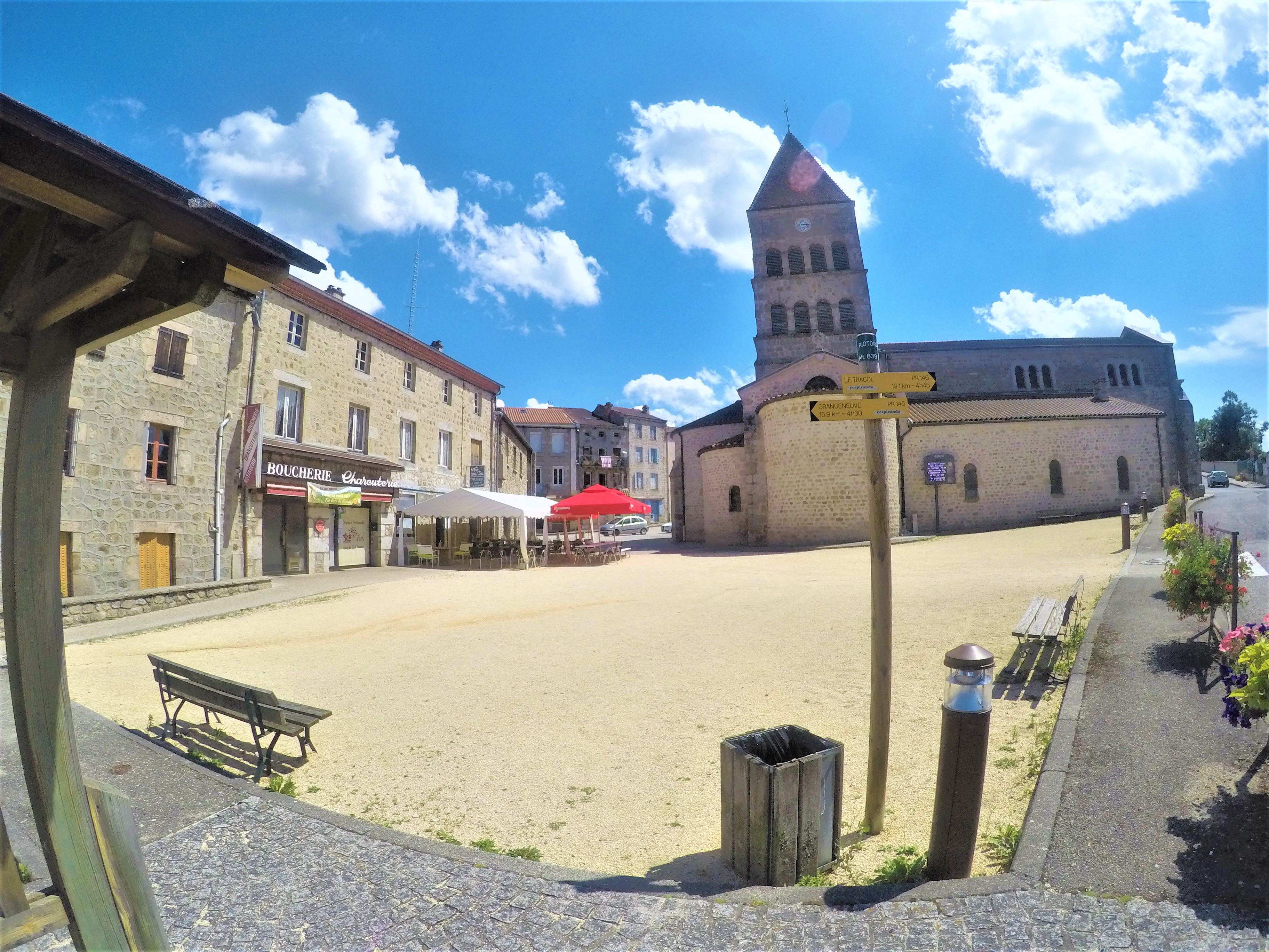 place de l'église 43220 riotord